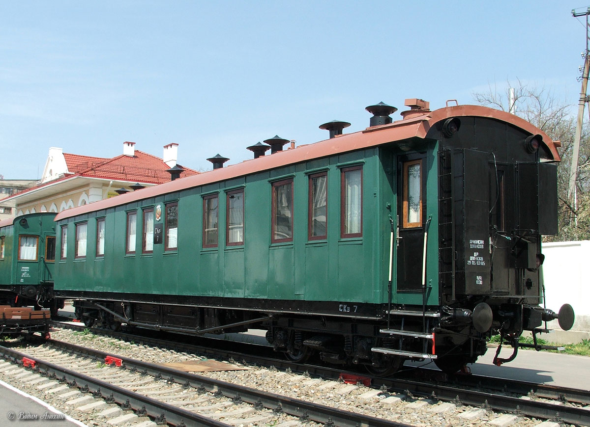 Пассажирские вагоны. Ростовский музей железнодорожного транспорта СКЖД